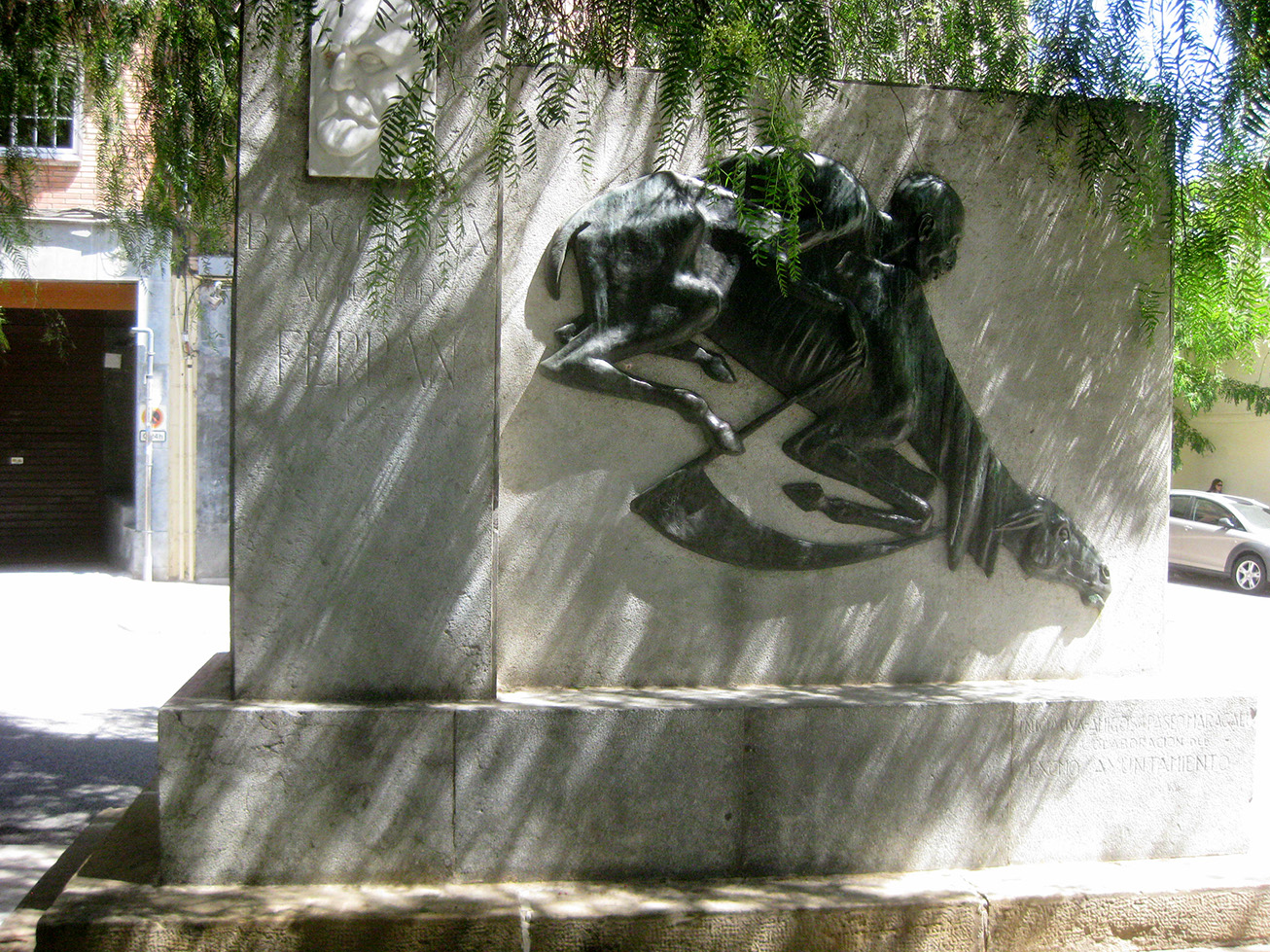 Al doctor Ferran (Josep Cañas). Pg. Maragall, 156 (Barcelona)